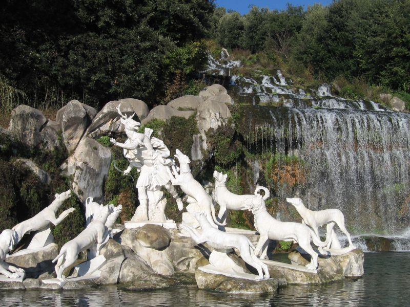 Reggia di Caserta, Caserta, Italia